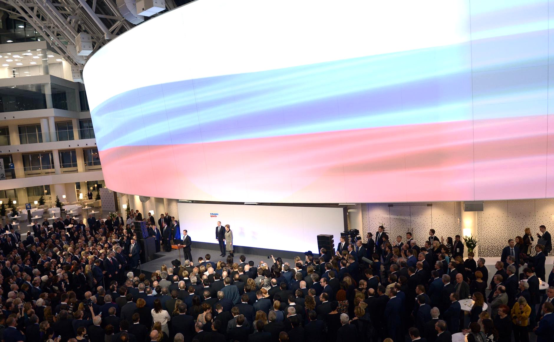 Открытие Ельцин-центра в здании бывшего конгресс-холла "Демидов", 25 ноября 2015 года